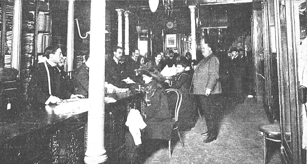 Vista del interior de la gran sastrería «El Corte Inglés», Madrid, en la revista española Nuevo Mundo.